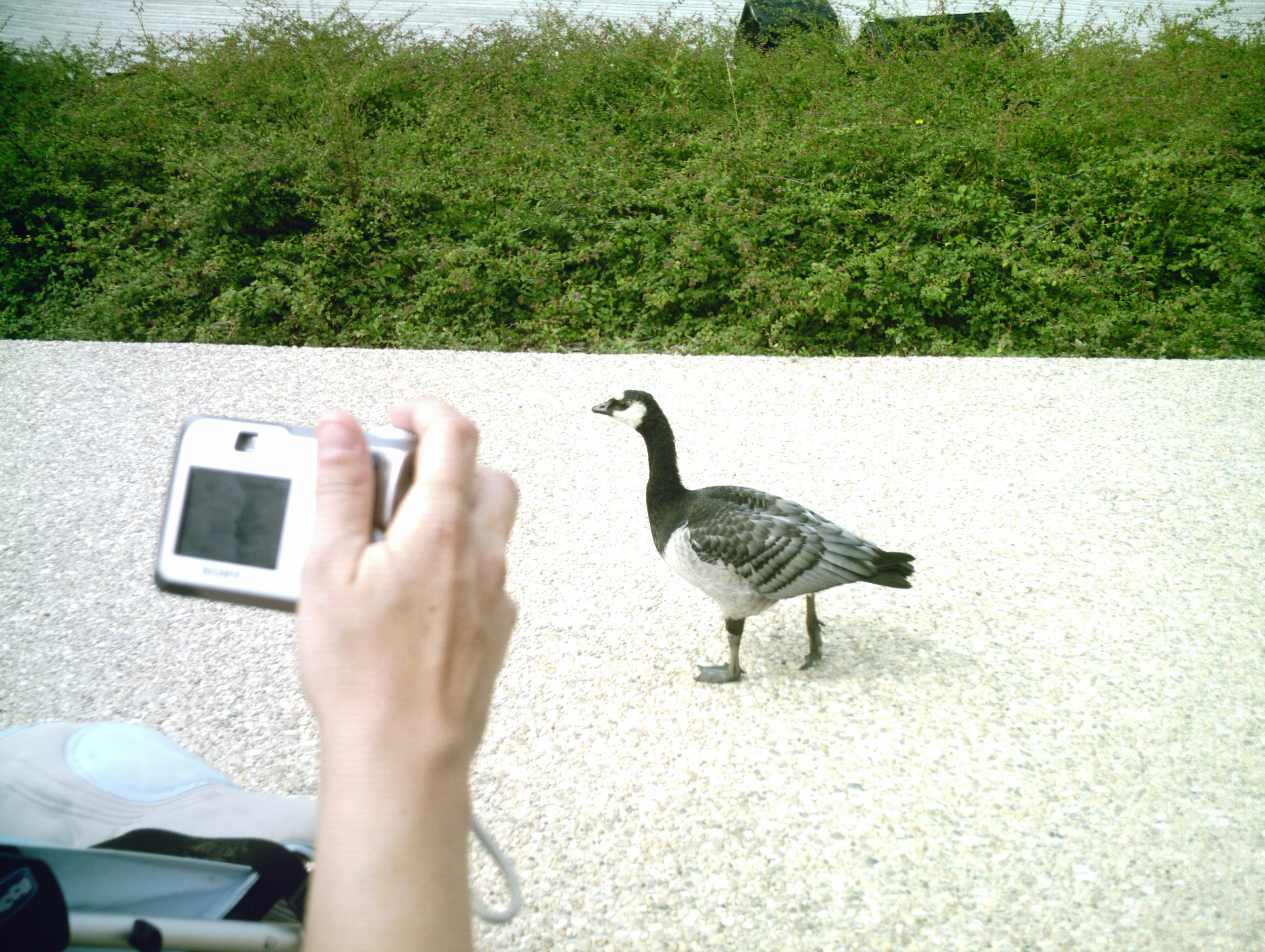 Oiseau à proximité du public lors du spectacle au Parc des oiseaux de Villars-les-Dombes.